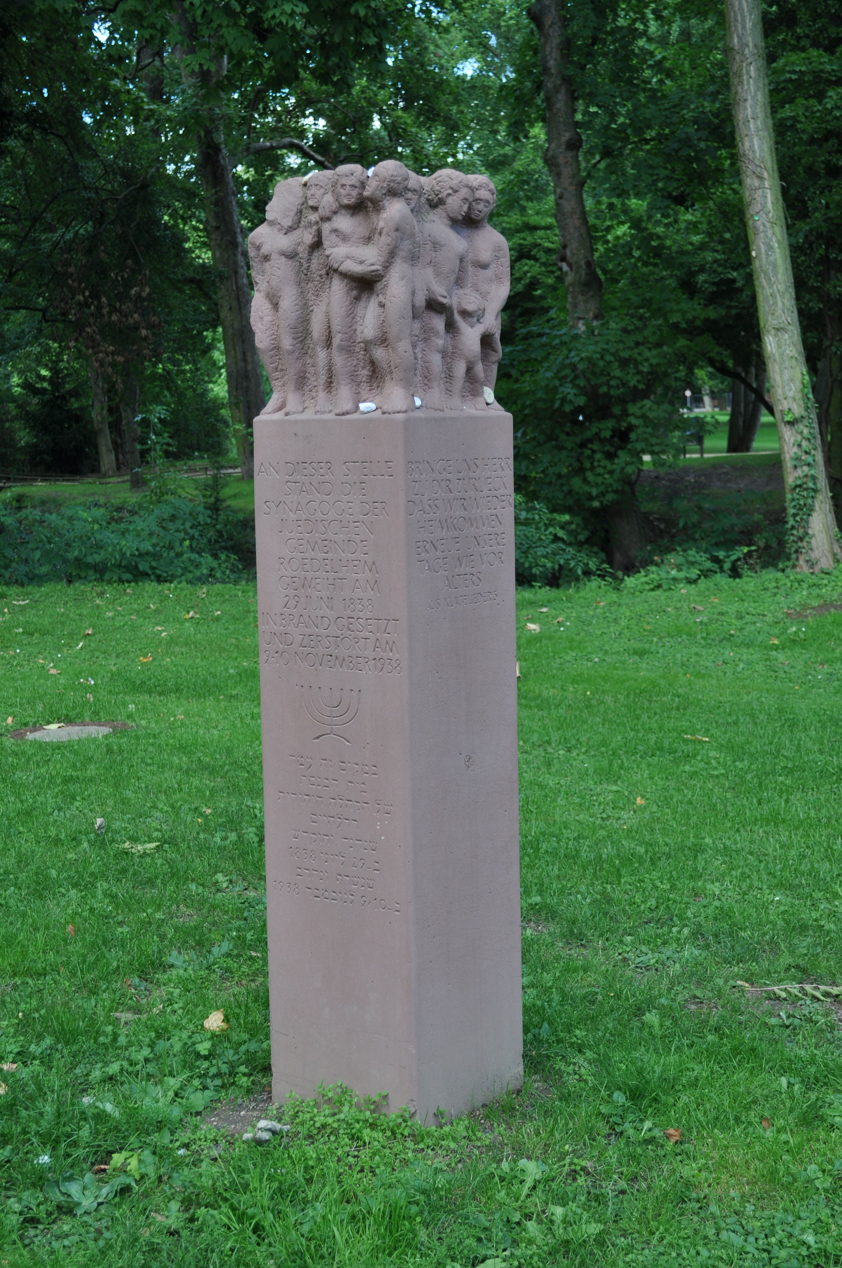 Denkmal zur Erinnerung an die ehemalige Synagoge von Frankfurt-Rödelheim. Das Denkmal befindet sich am ehemaligen Standort der Synagoge und wurde 1980 von Christof Krause geschaffen